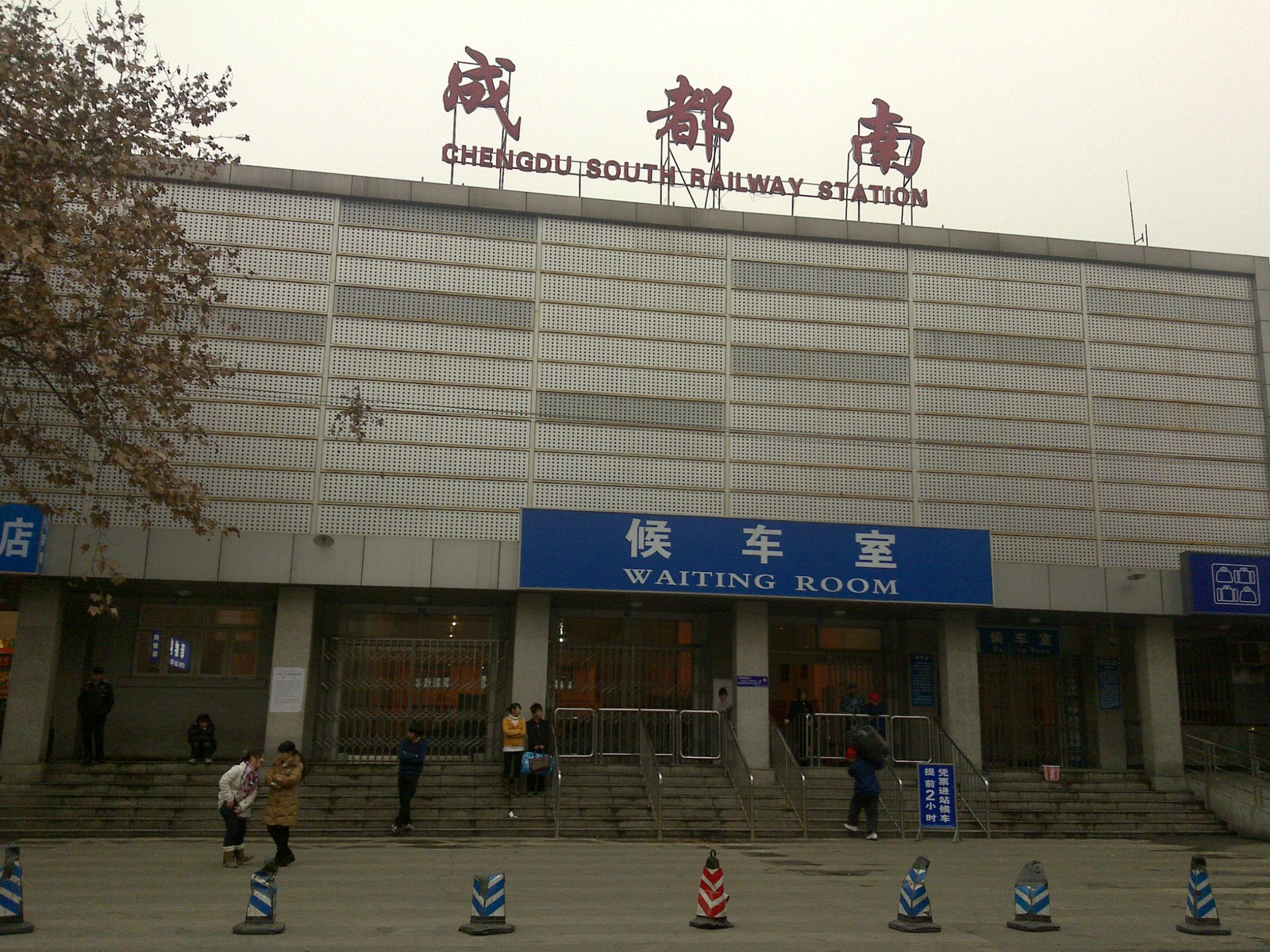 成都南站北侧旧站房-2010